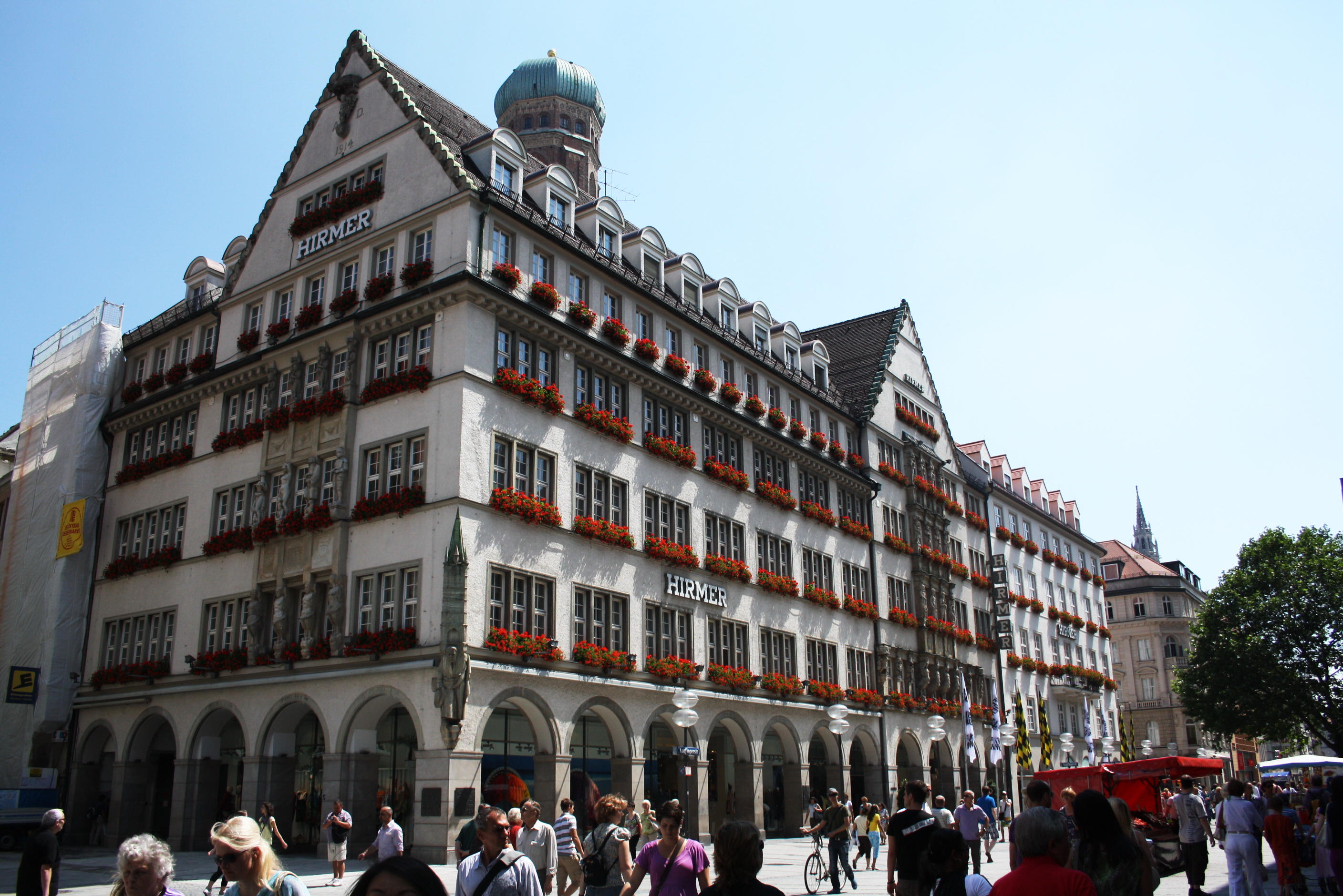 München, Kaufingerstrasse 28 (Hirmer - ein Bekleidungsgeschäft in der Münchner Fußgängerzone)